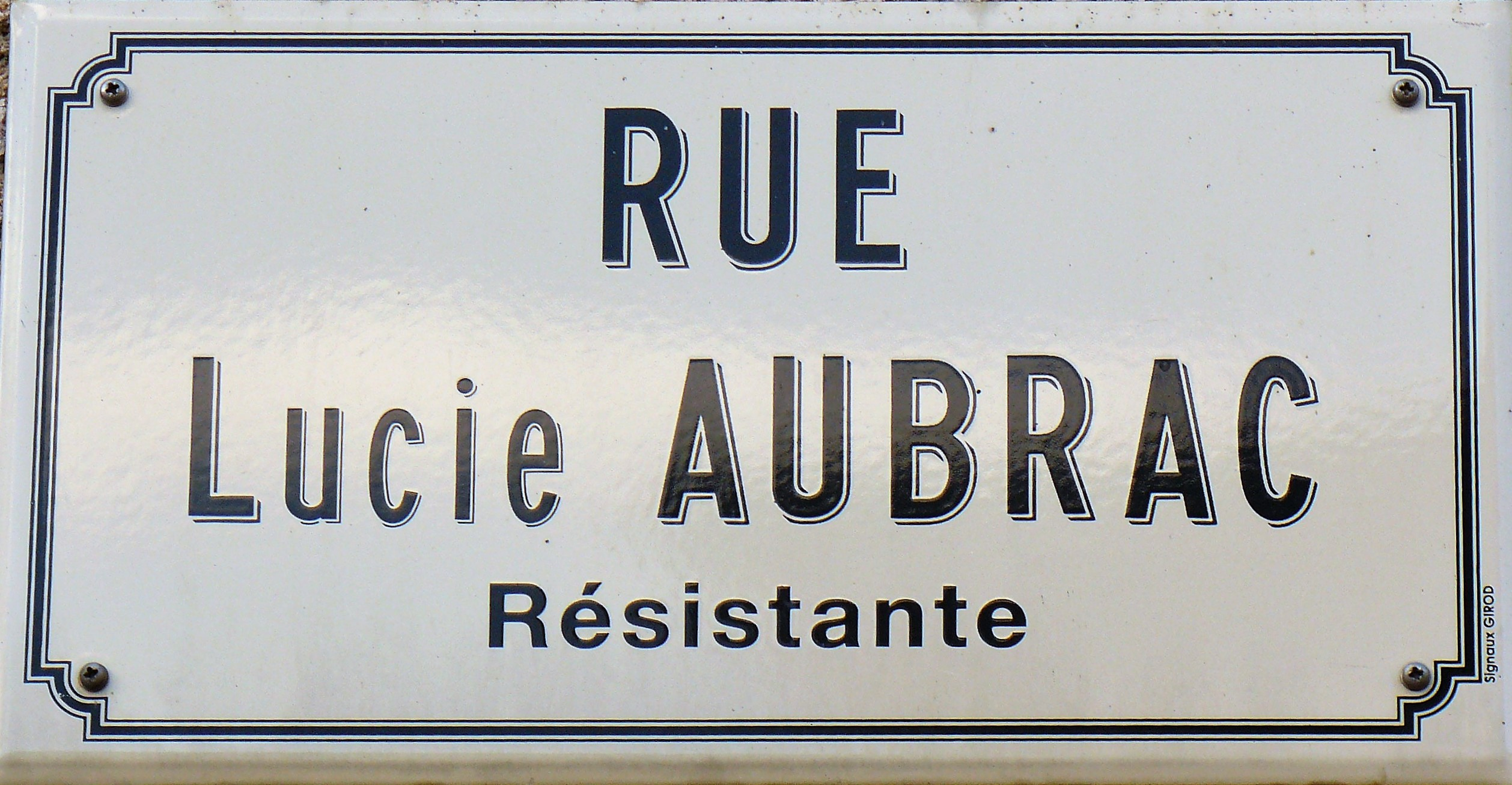 Rue Lucie Aubrac à Salornay-sur-Guye